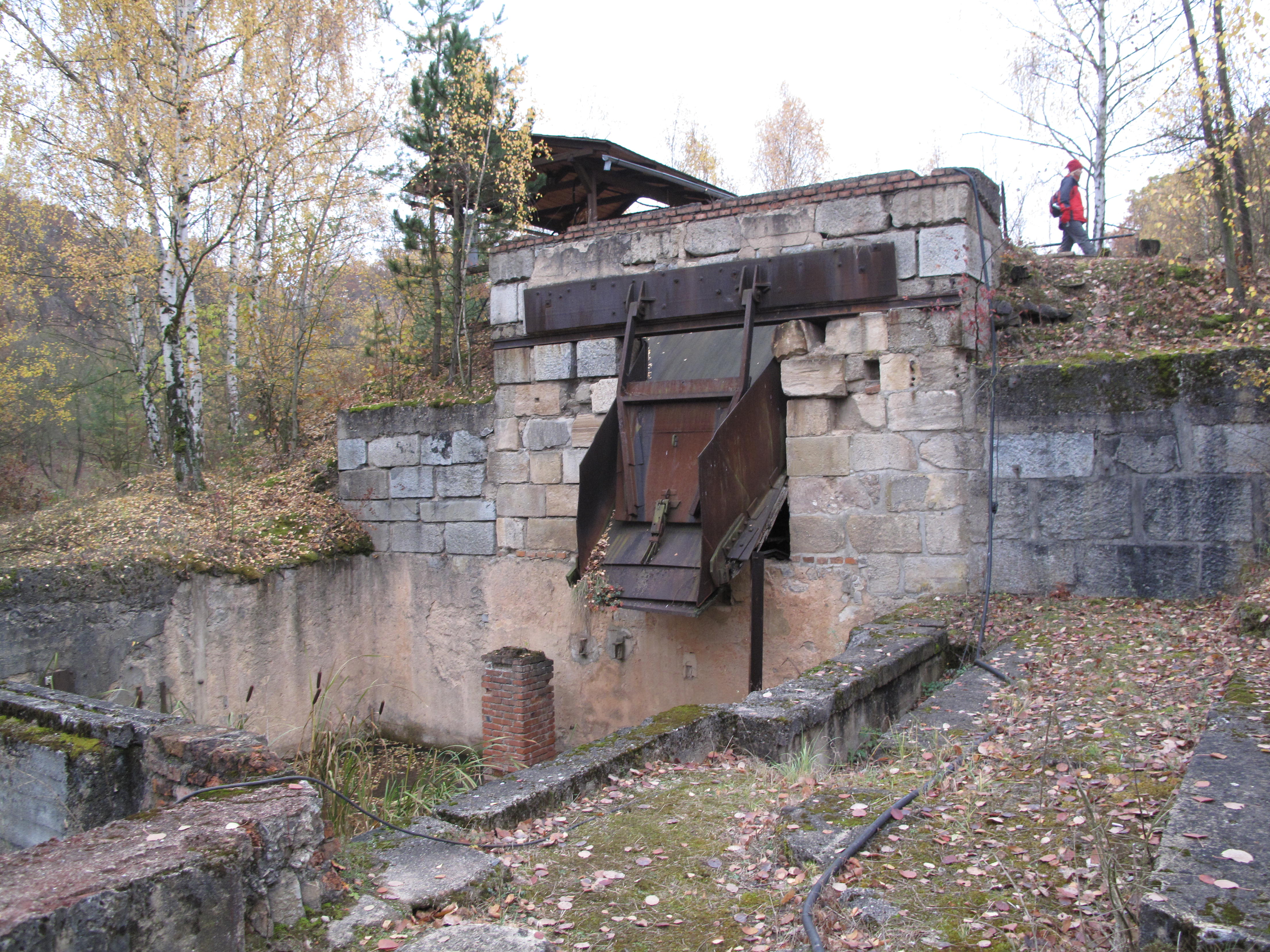 Česky: Solvayovy lomy